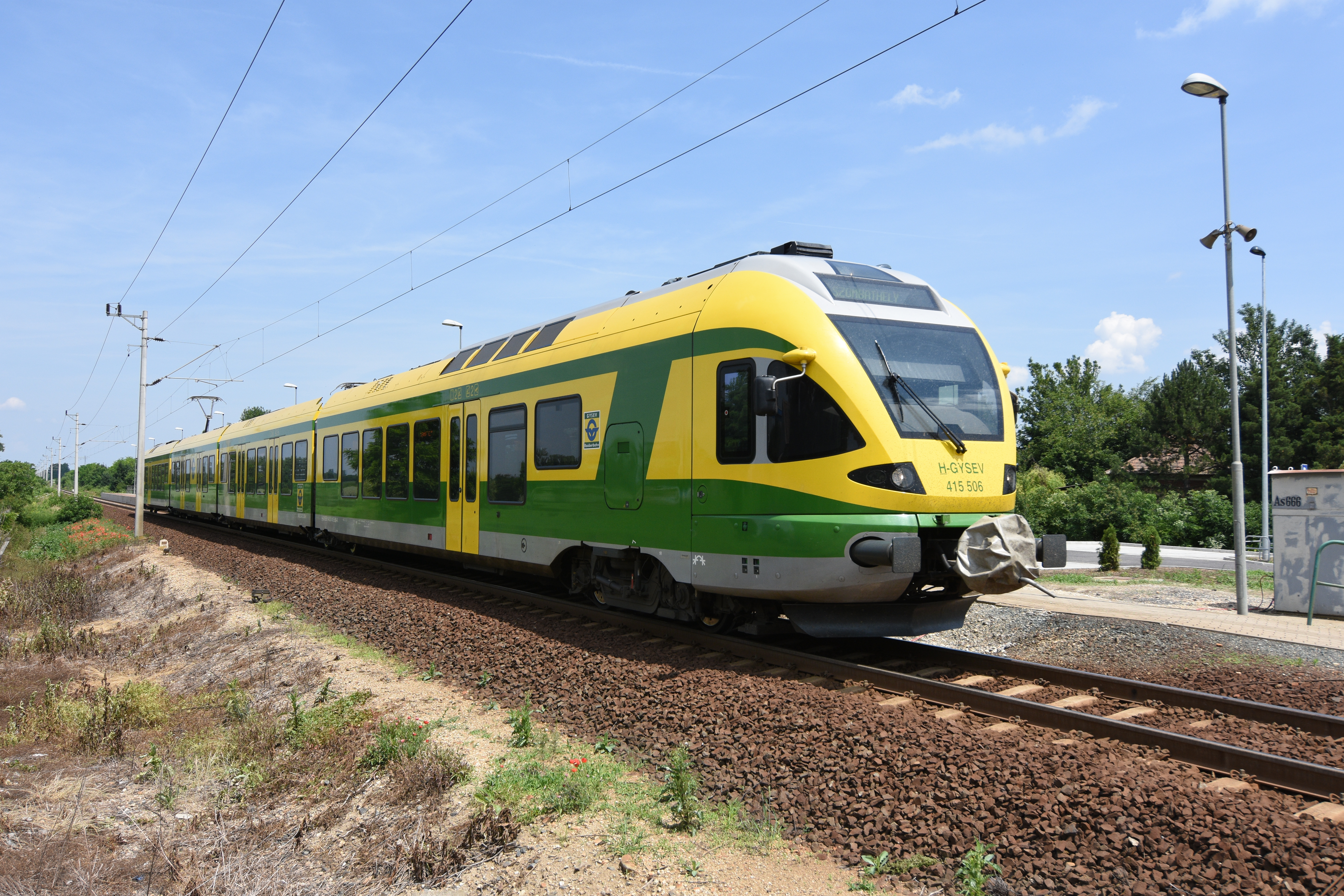 GySEV 415 506 at Tormásliget railway station